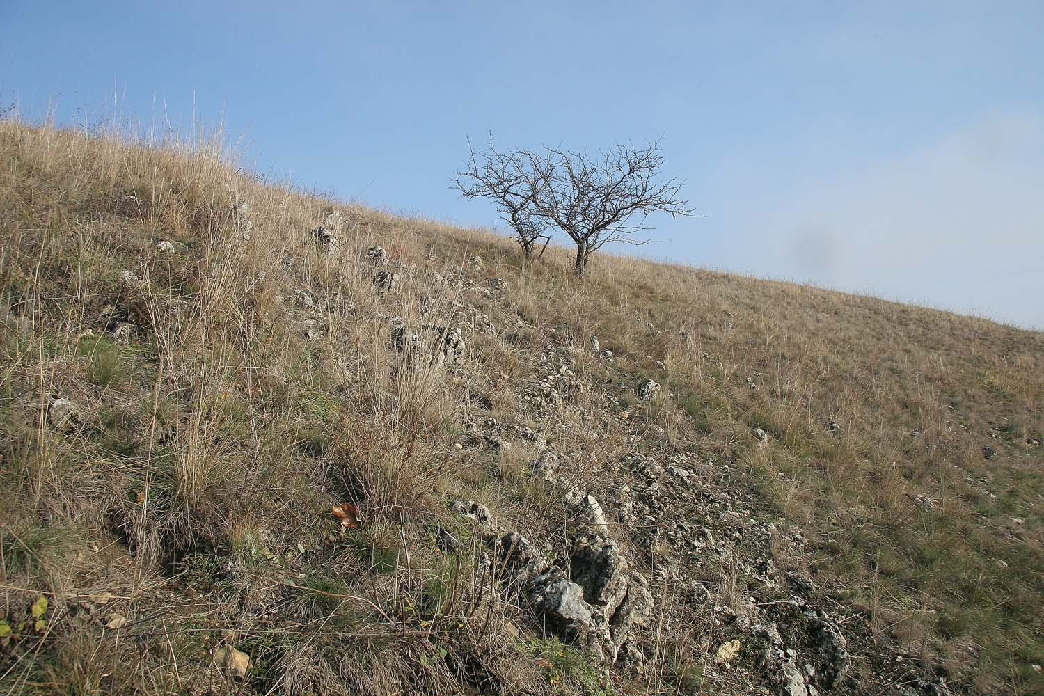 PP Cikánka I, Praha autor: Prazak Date: 11. 2006